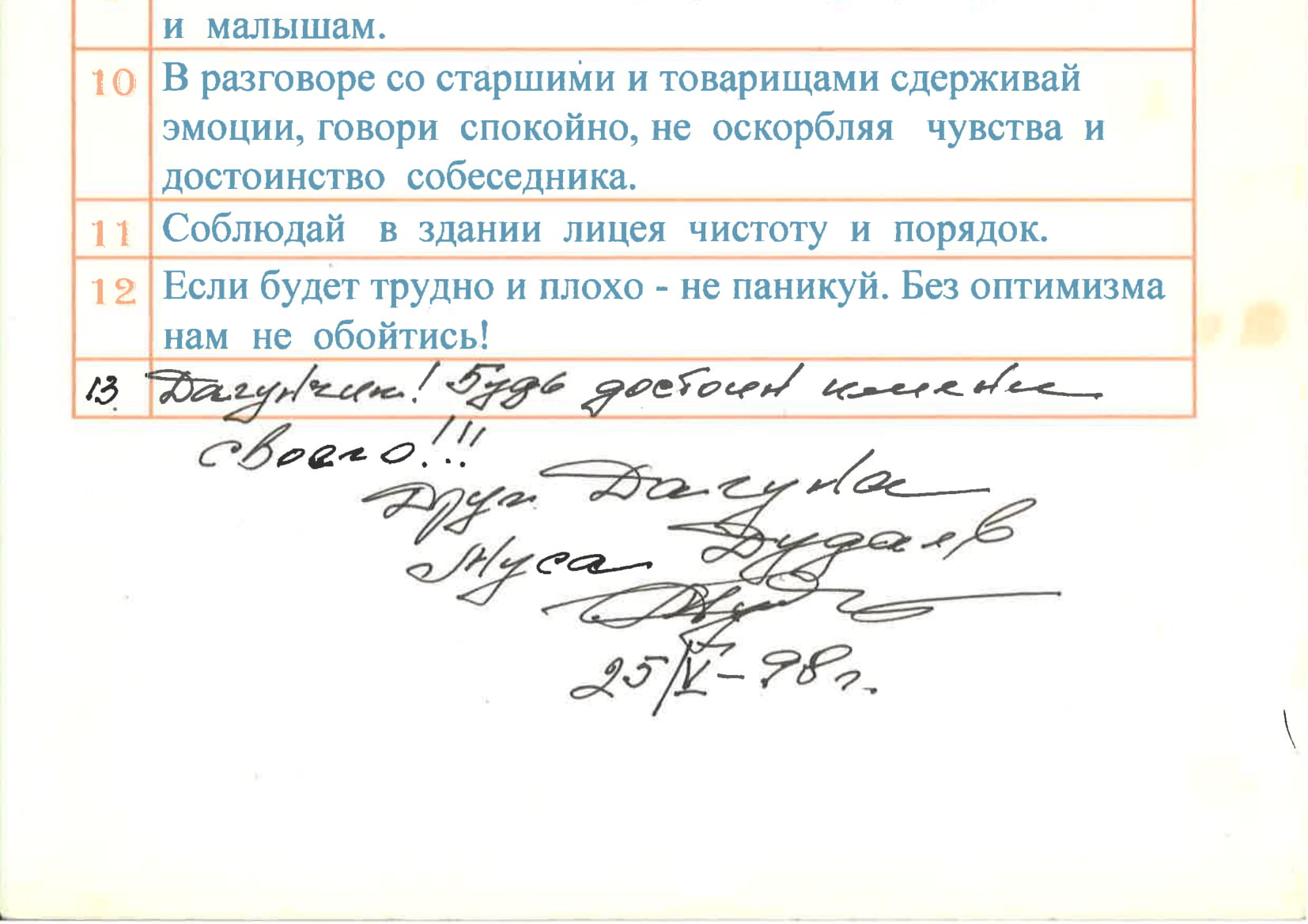 Autographe de l'acteur tchétchène Moussa Doudaïev (1938-2014) donné le 25 mai 1998, à Grozny, capitale de la Tchétchénie.